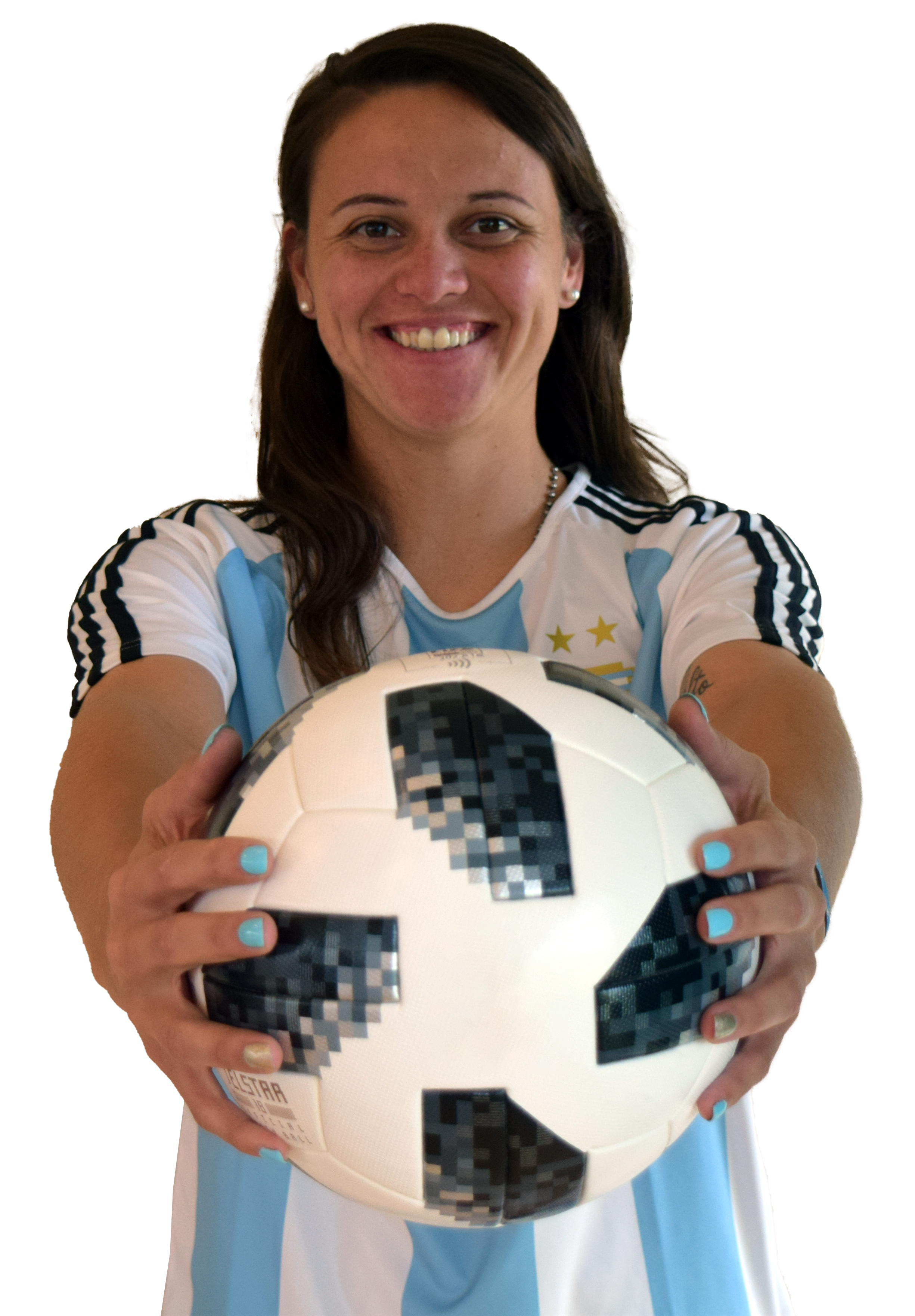 Florencia Bonsegundo, jugadora de la selección mayor femenina de fútbol de Argentina.Foto sacada previo al primer partido del repechaje por un lugar para el mundial de futbol femenino de Francia 2019